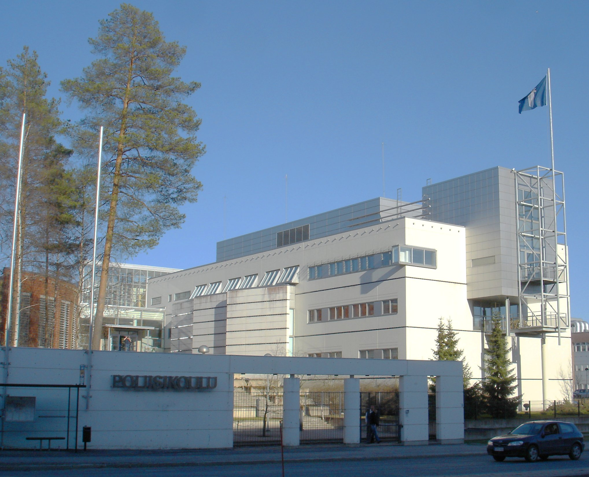 The National Police School of Finland located in Hervanta. Hervannassa sijaitseva Suomen Poliisiammattikorkeakoulu